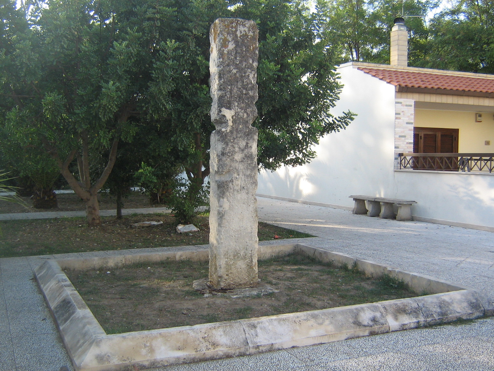 Menhir Aia della Corte a Lequile